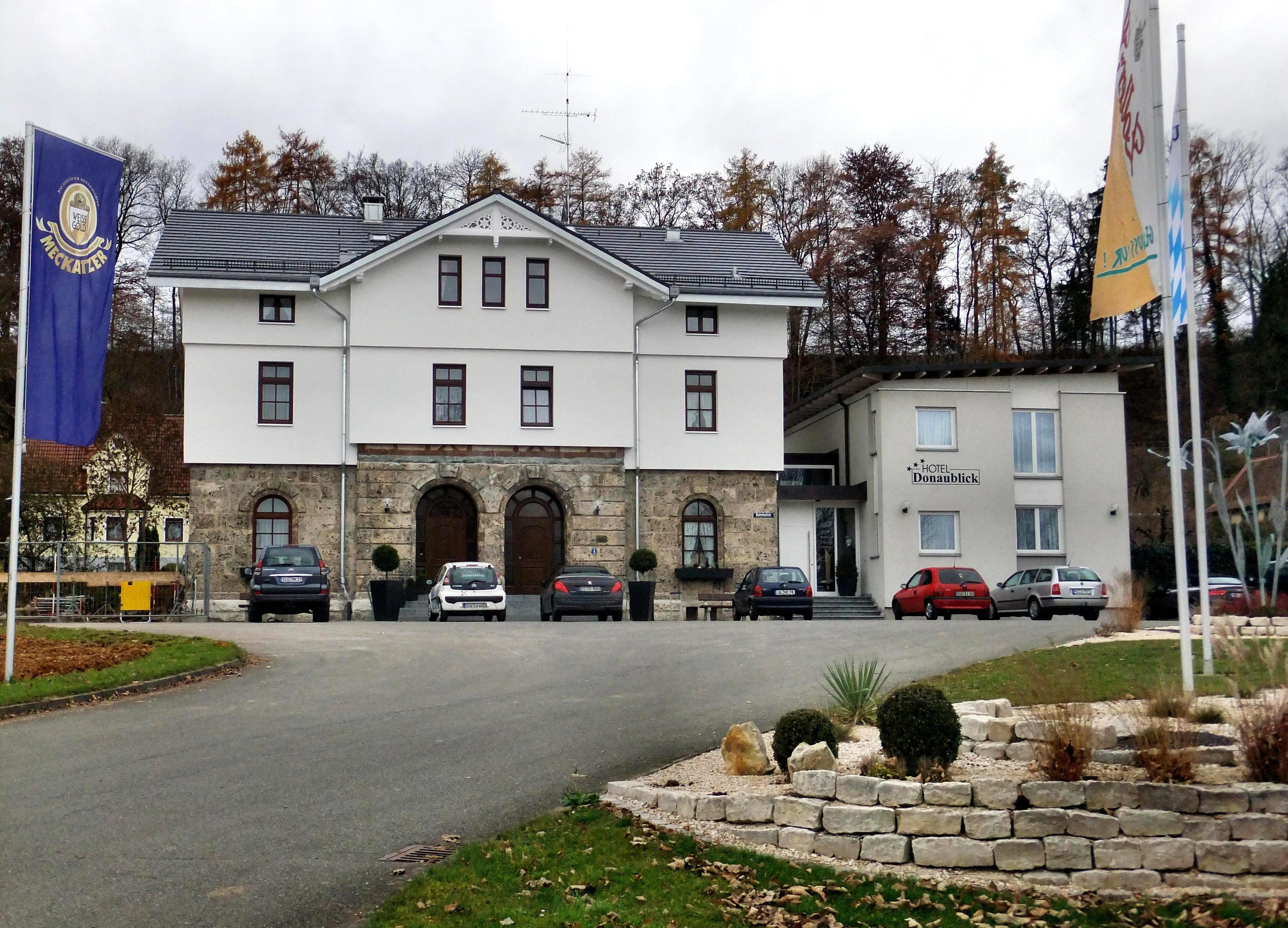 Der zum Hotel umgebaute ehemalige Bahnhof von Scheer an der Bahnstrecke Ulm–Donaueschingen